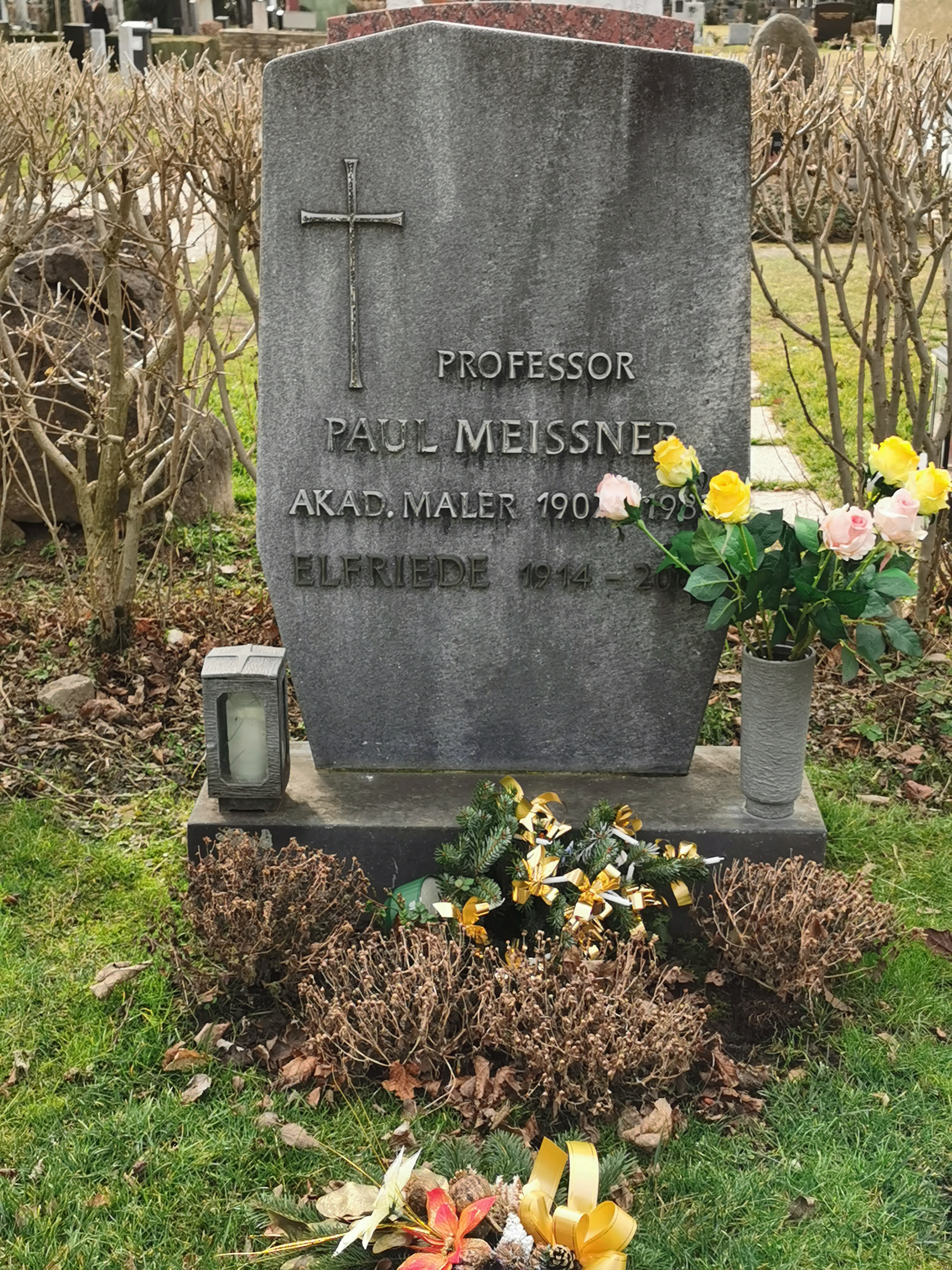 Grab des Maler Paul Meissner auf dem Wiener Zentralfriedhof